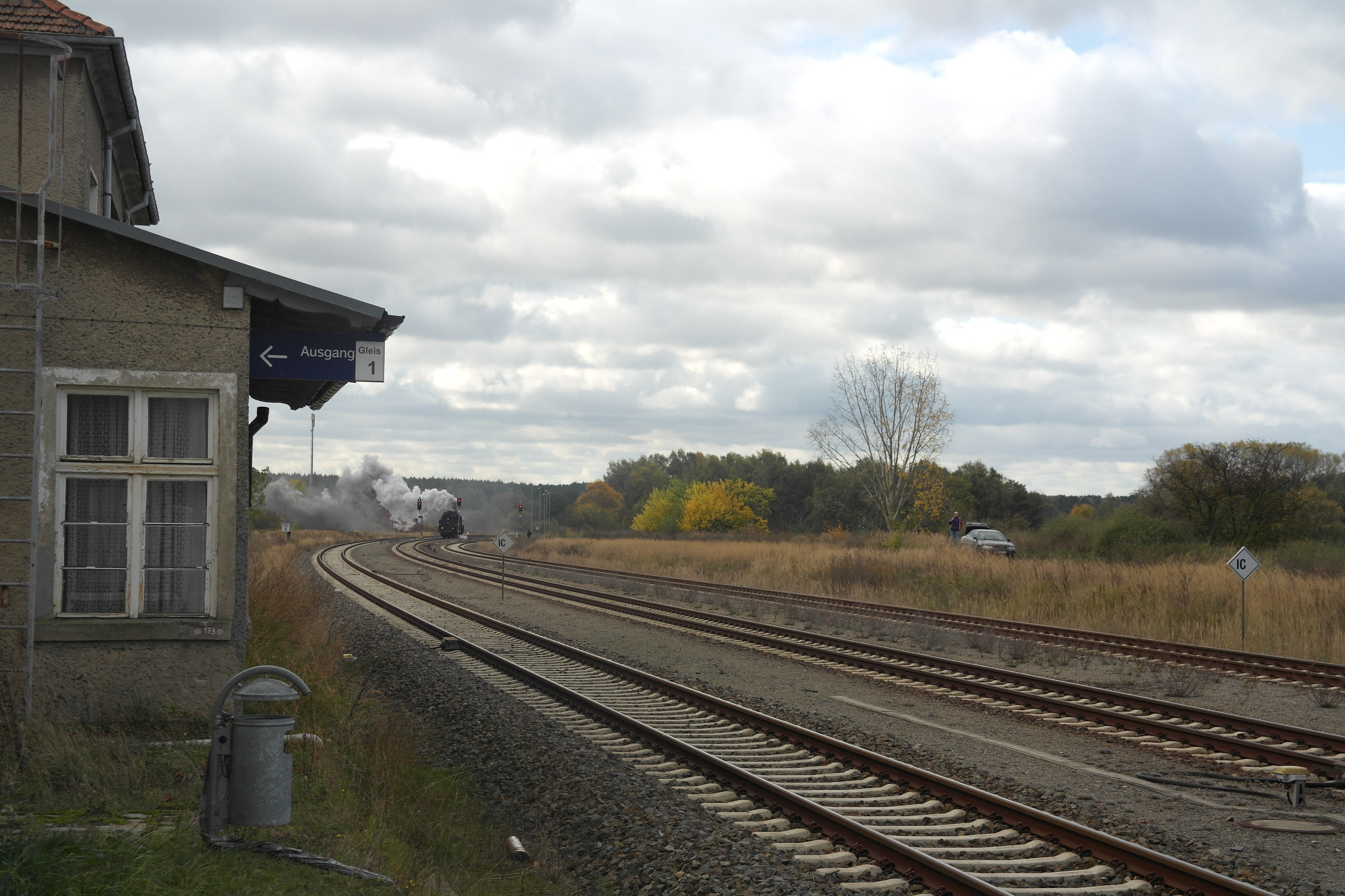 Bahnhof Tantow, ehemaliges Empfangsgebäude